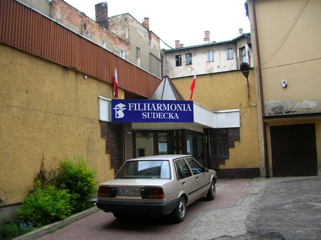 Wałbrzych - Filharmonia Sudecka.